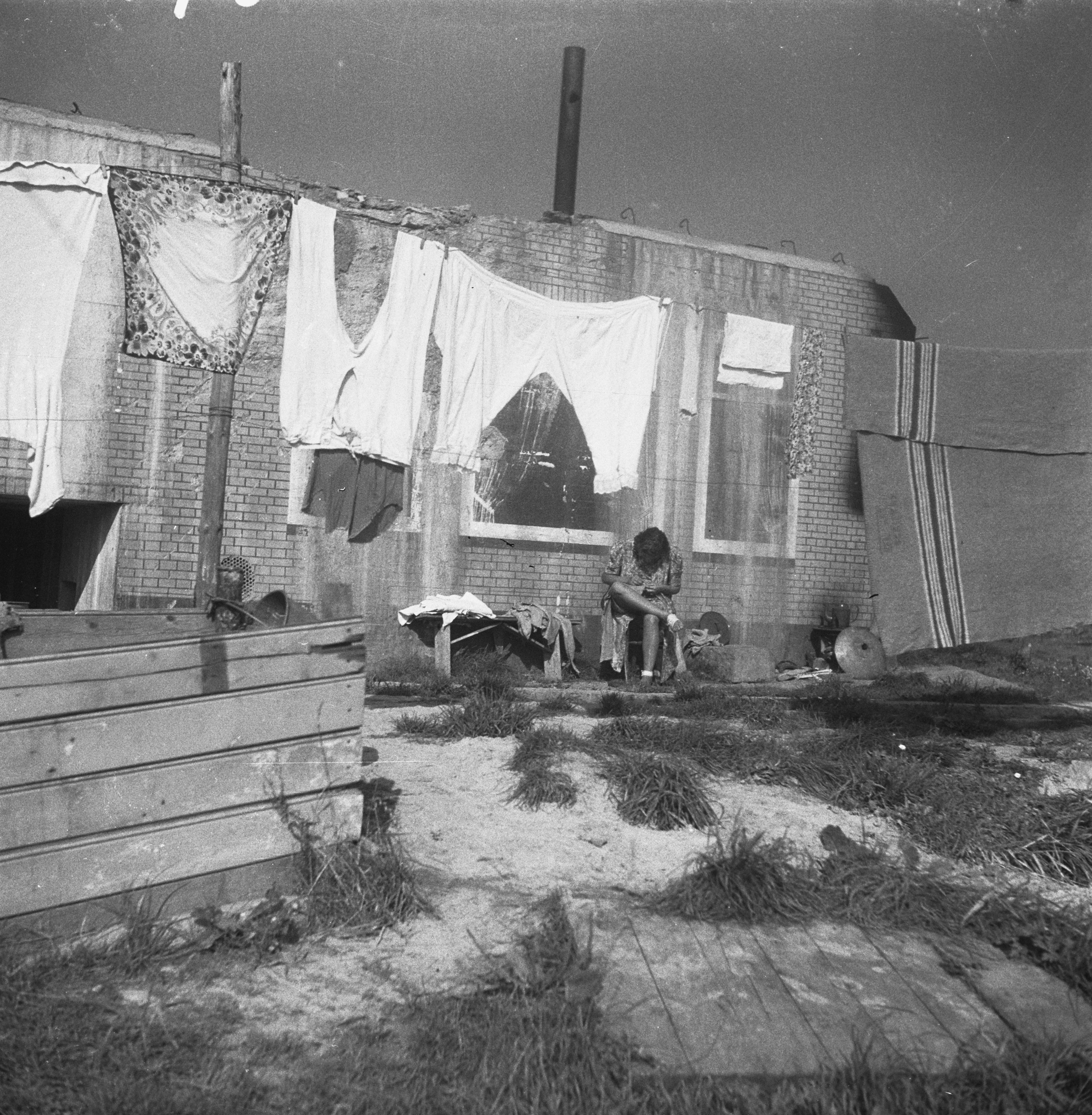 Collectie / Archief : Fotocollectie Anefo Reportage / Serie : [ onbekend ] Beschrijving